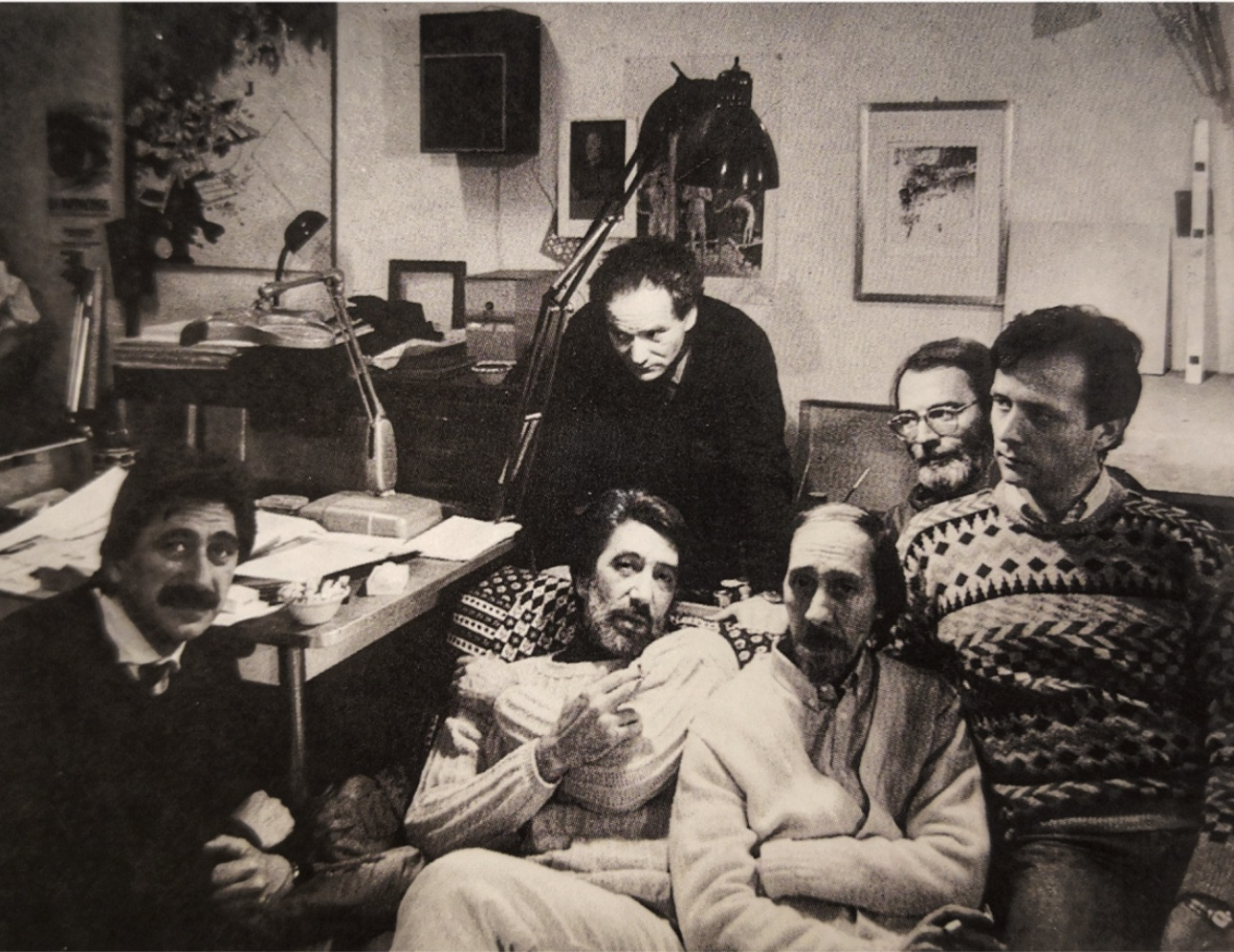 Giuseppe Bartolini, Giuseppe Biagi (in piedi), Sandro Luporini, Gianfranco Ferroni, Giorgio Tonelli e Lino Mannocci nello studio milanese di Ferroni, 1983.